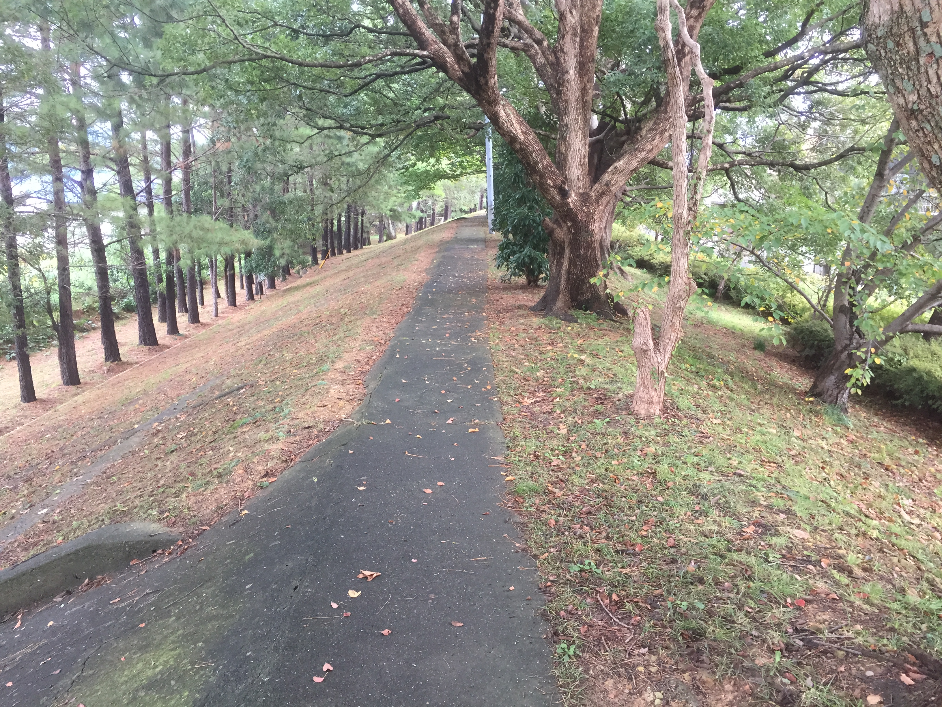 広村堤防の歩道